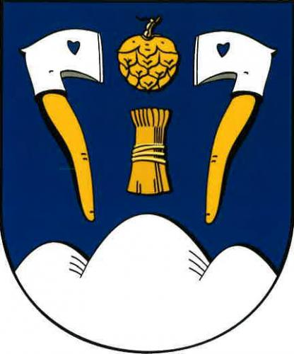 znak, Hořovičky, okres Rakovník